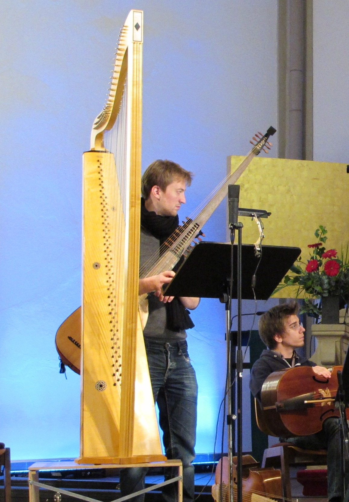 Nicolas Achten bei der Einspielprobe. An den Tagen der Alten Musik in Herne im November 2012.